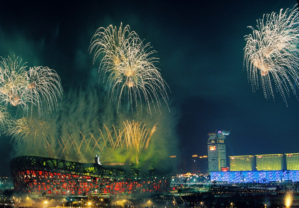 北京奥运会开幕式烟花